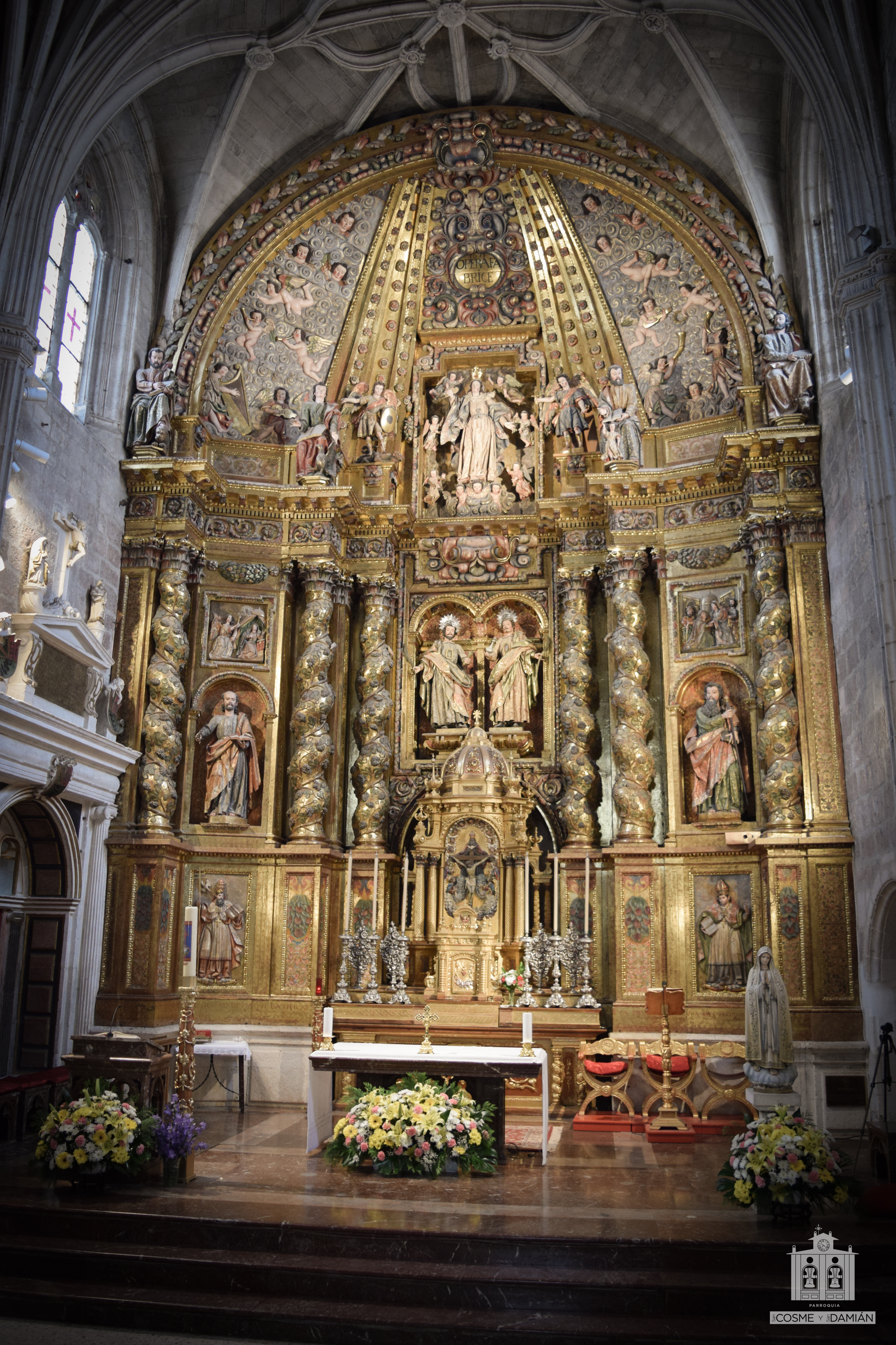 Presbiterio de la Parroquia de San Cosme y San Damián de la ciudad de Burgos